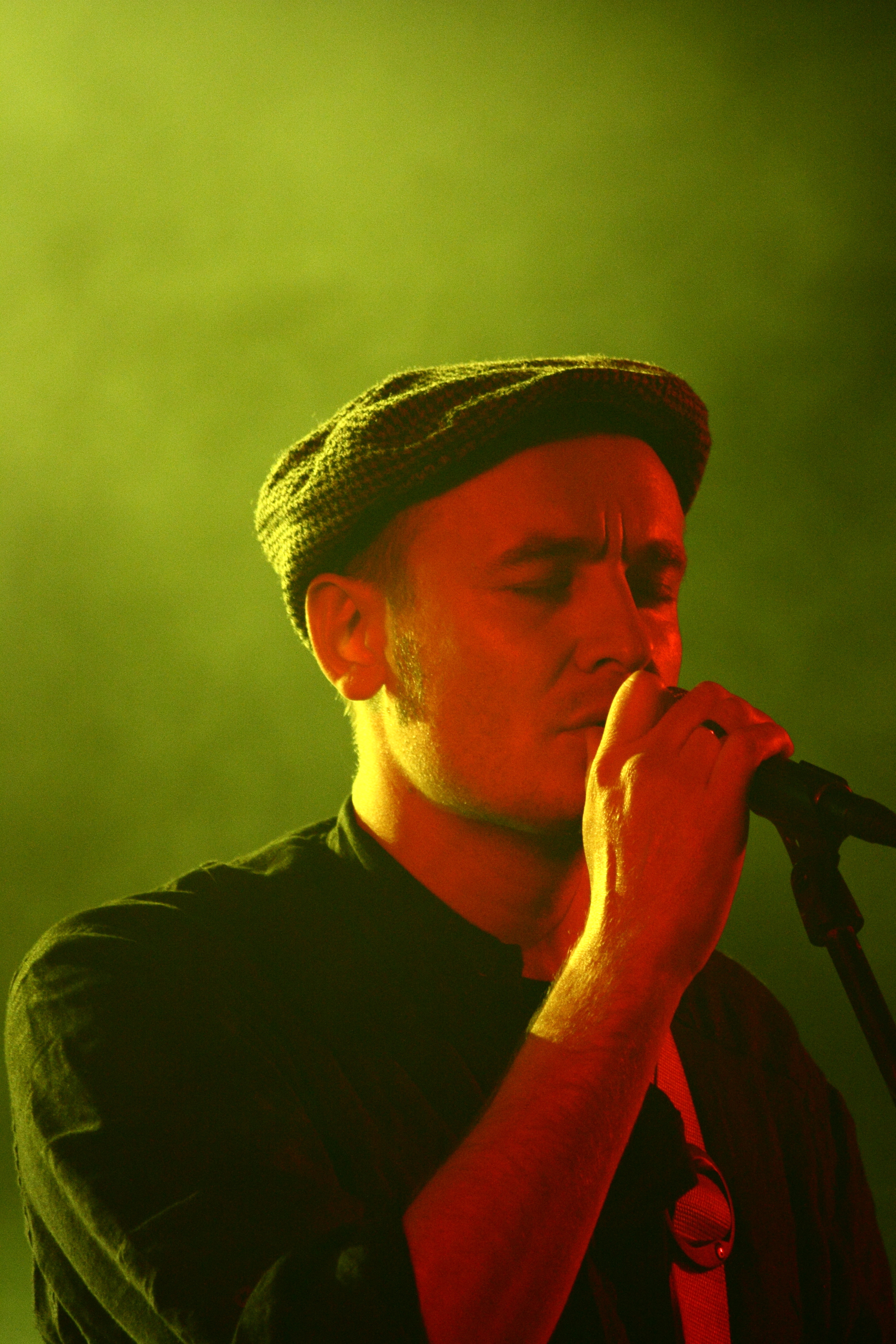 Koncert Lao Che w Wesołej, 18 września 2010.